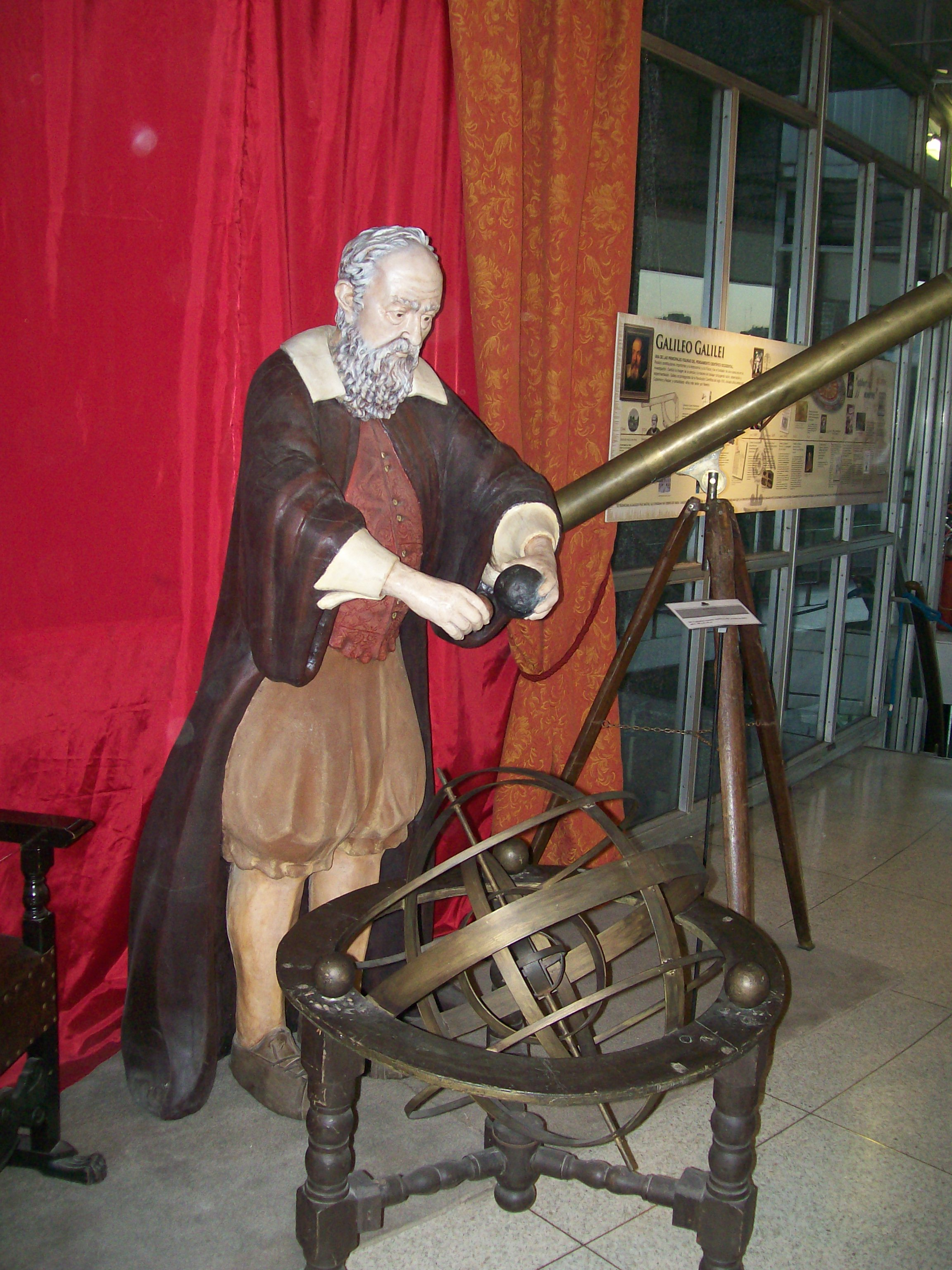 Representacion de Galileo Galilei